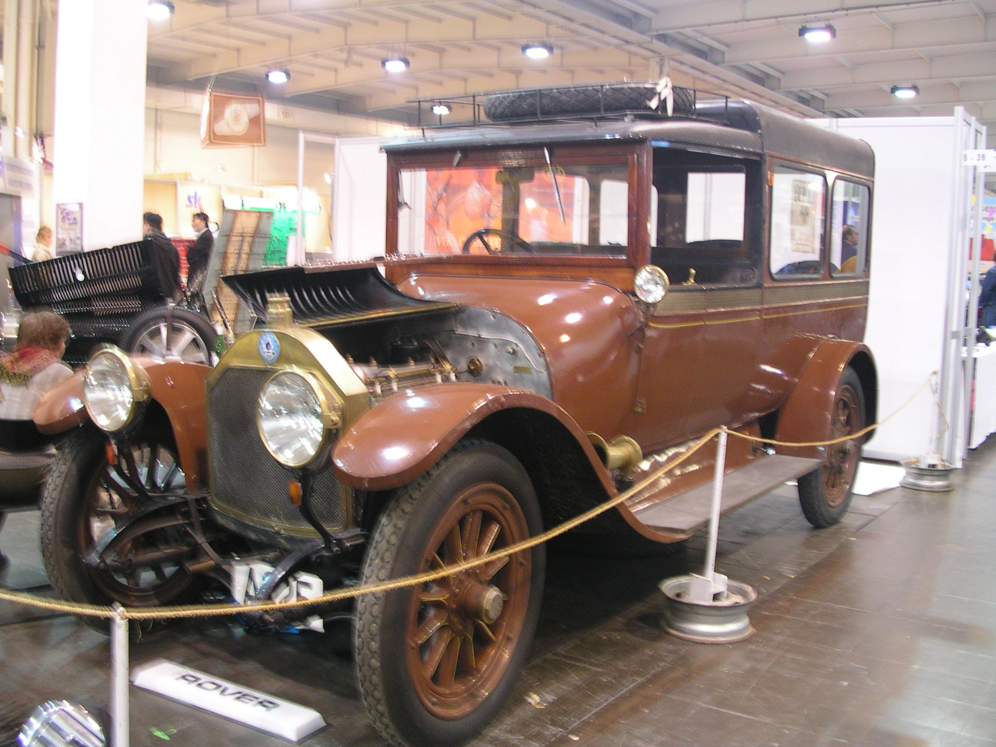 Berliet von 1915 in Essen bei der Technoclassica 2005